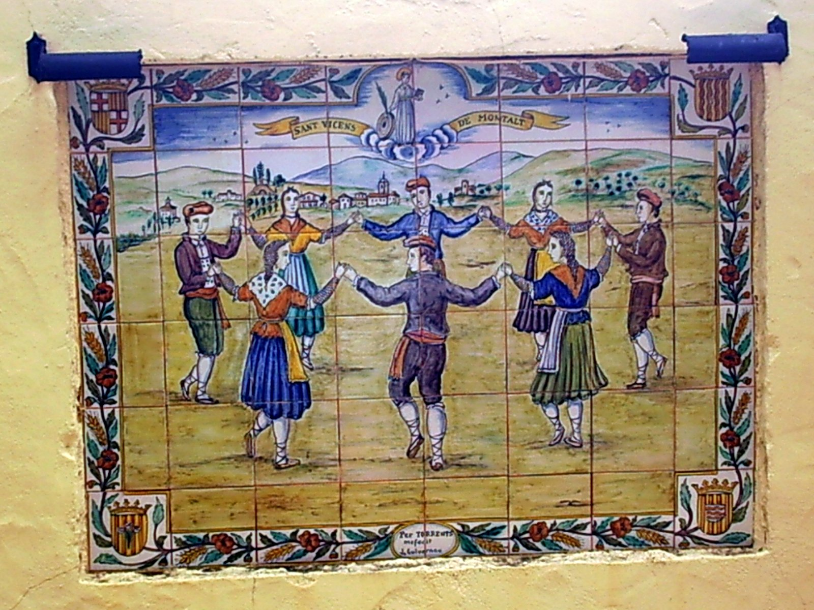 Ceràmica de la Sardana, a Sant Vicenç de Montalt, comarca del Maresme, Catalunya.